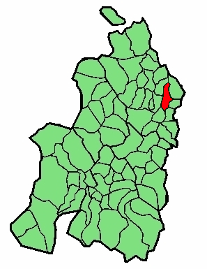 aipaturiko udalerriaren kokapena Nafarroa Beherean